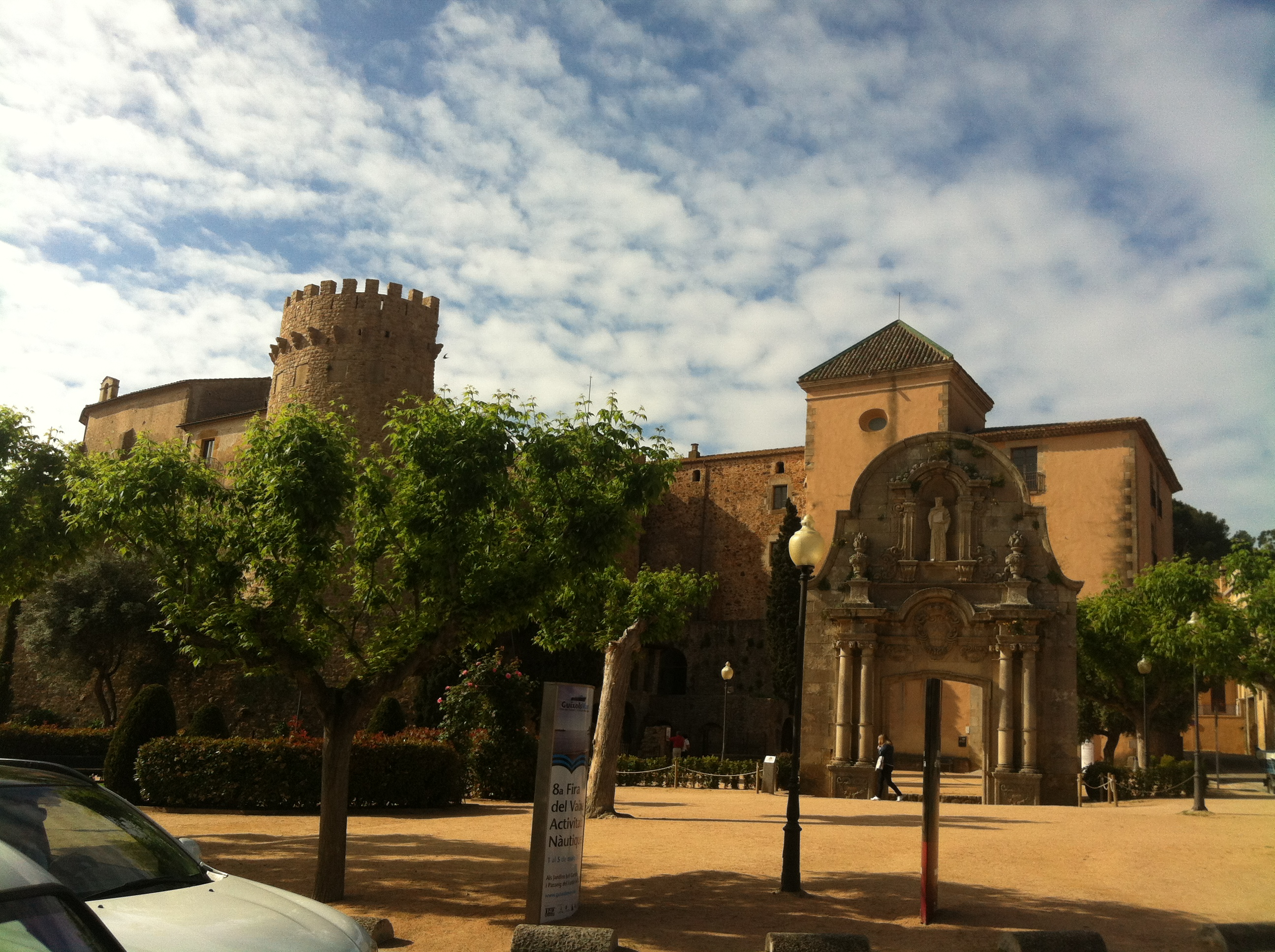 Monestir de Sant Feliu (Sant Feliu de Guíxols)